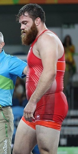 Wrestling at the 2016 Summer Olympics – Men's freestyle 125 kg